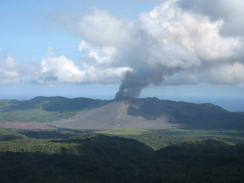 Mount Yasur on Vanuatu